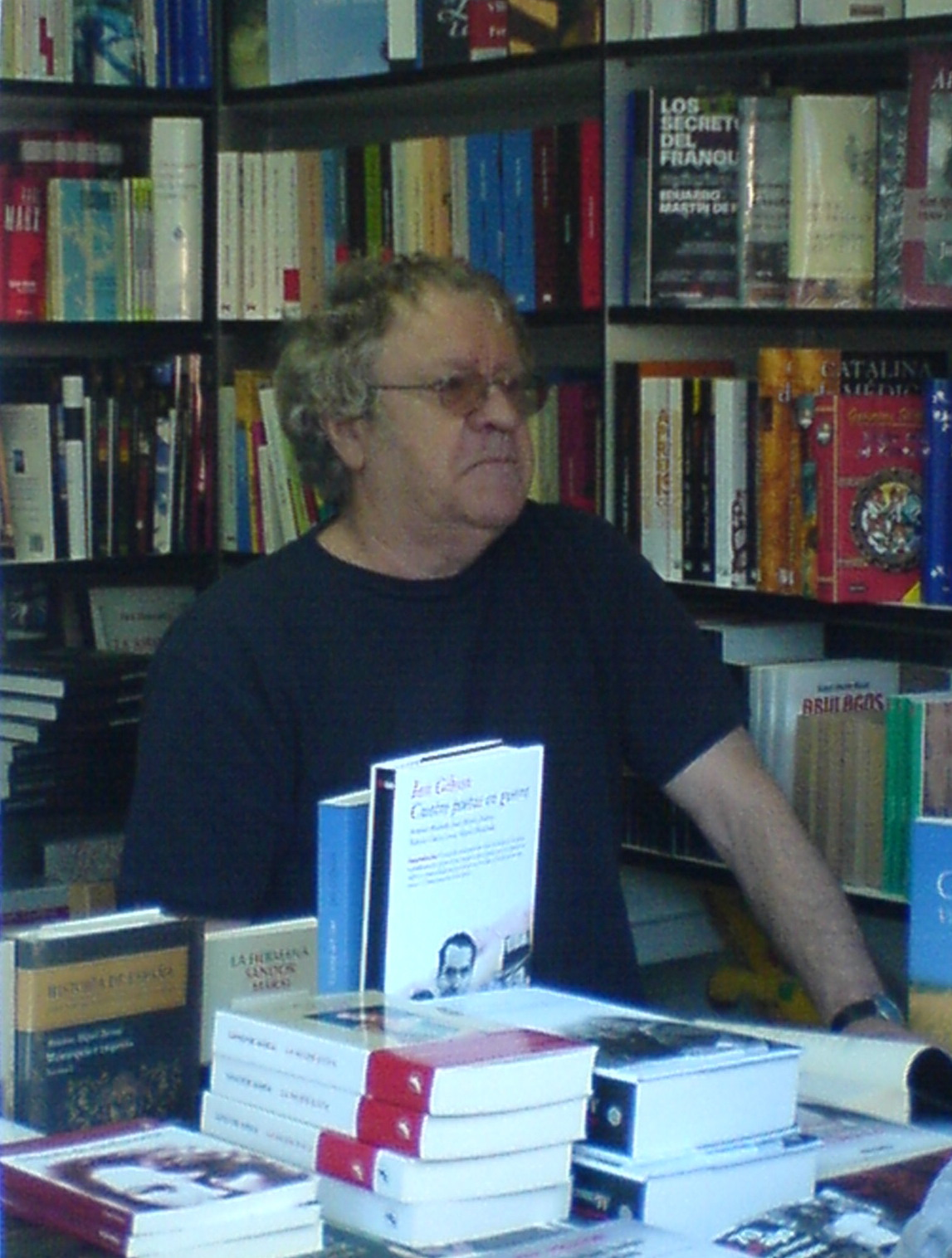 El irlandés Ian Gibson firmando su último libro en la Feria del Libro de Madrid de 2006. Fotografía hecha con un teléfono móvil.